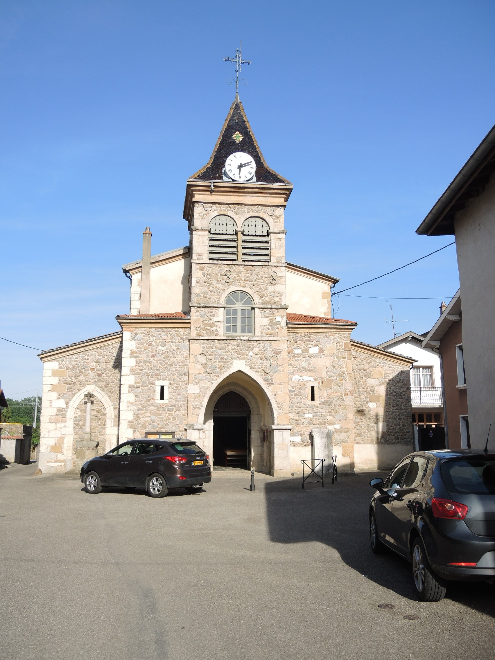 Limony détail